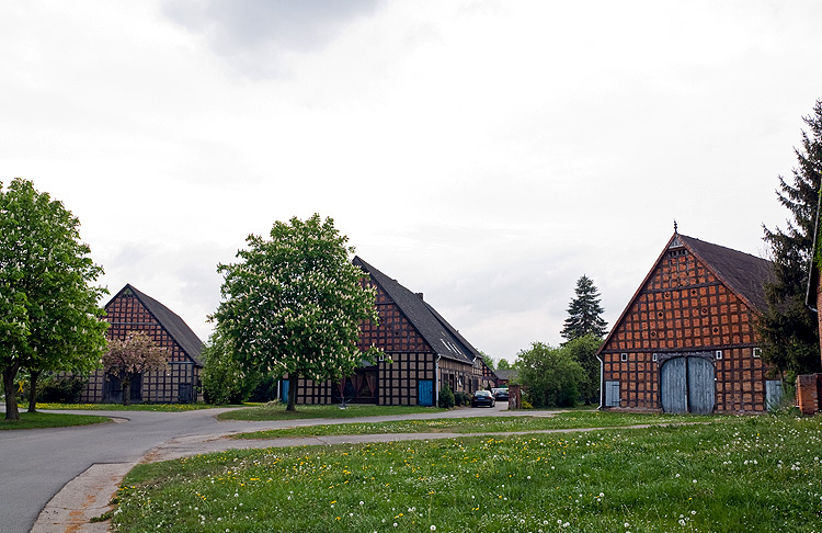 Giebelständige Vierständerhallenhäuser im Saaßer Rundling. Der Rundling hat eine besonders regelmäßige Form, durch die sich ein harmonisches und geschlossenes Ortsbild ergibt. Der Rundling mit einer Zufahrt, dem Dorfplatz und den anschließenden Hofanlagen steht als Gruppe baulicher Anlagen unter Denkmalschutz.